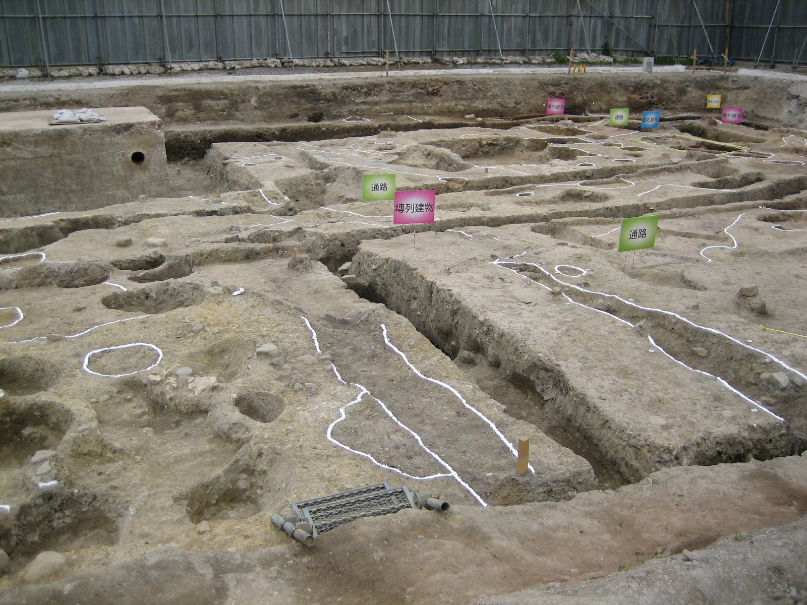 環濠都市の写真